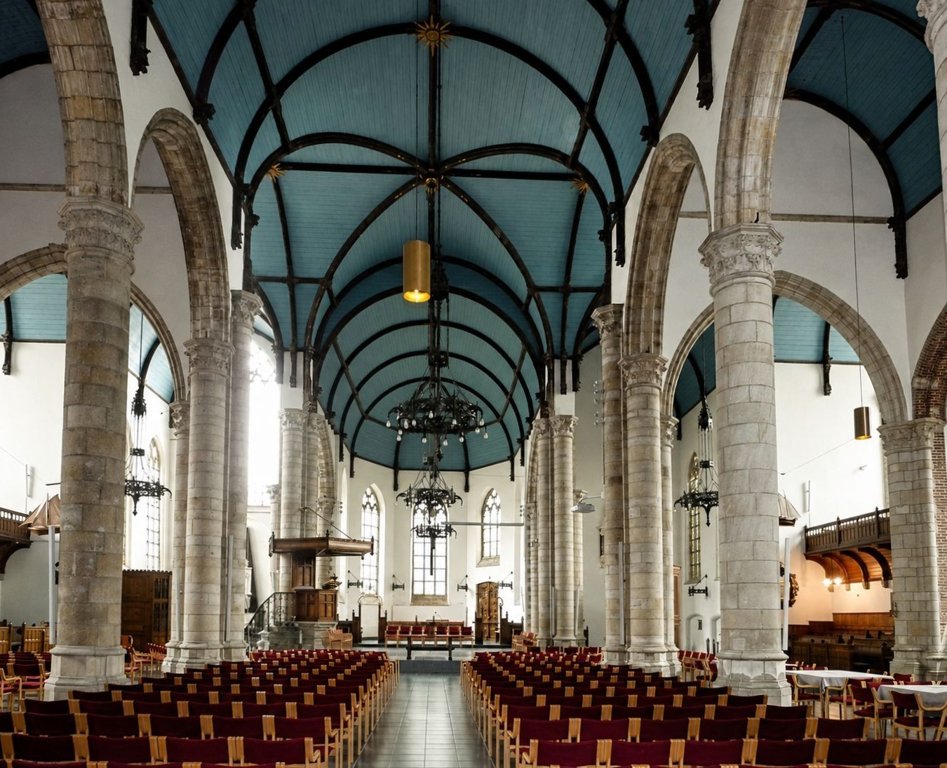 Sint Jacob (Vlissingen)